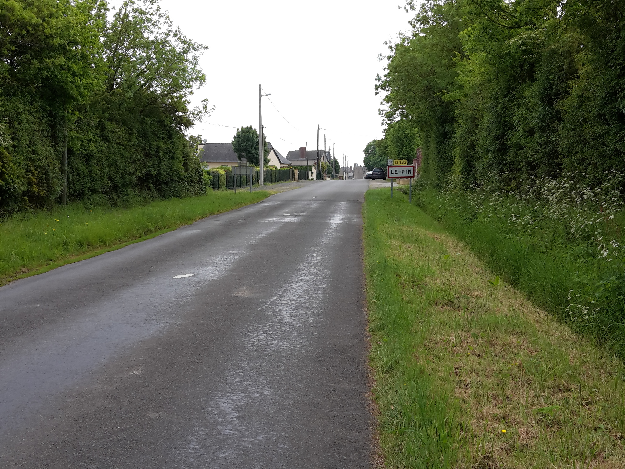 Entrée du bourg du Pin, Loire-Atlantique, France.